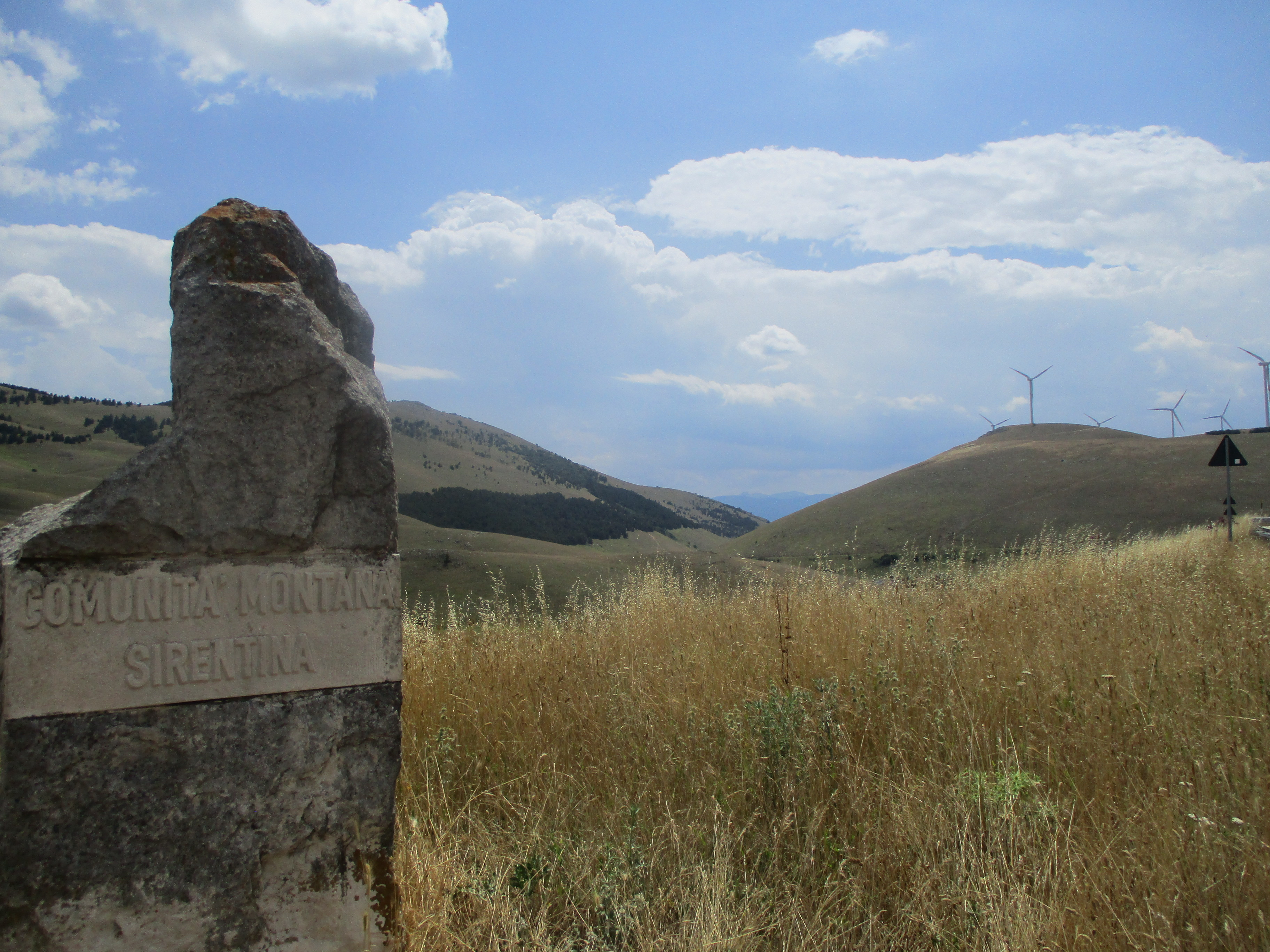 Ingresso Comunità Montana Sirentina